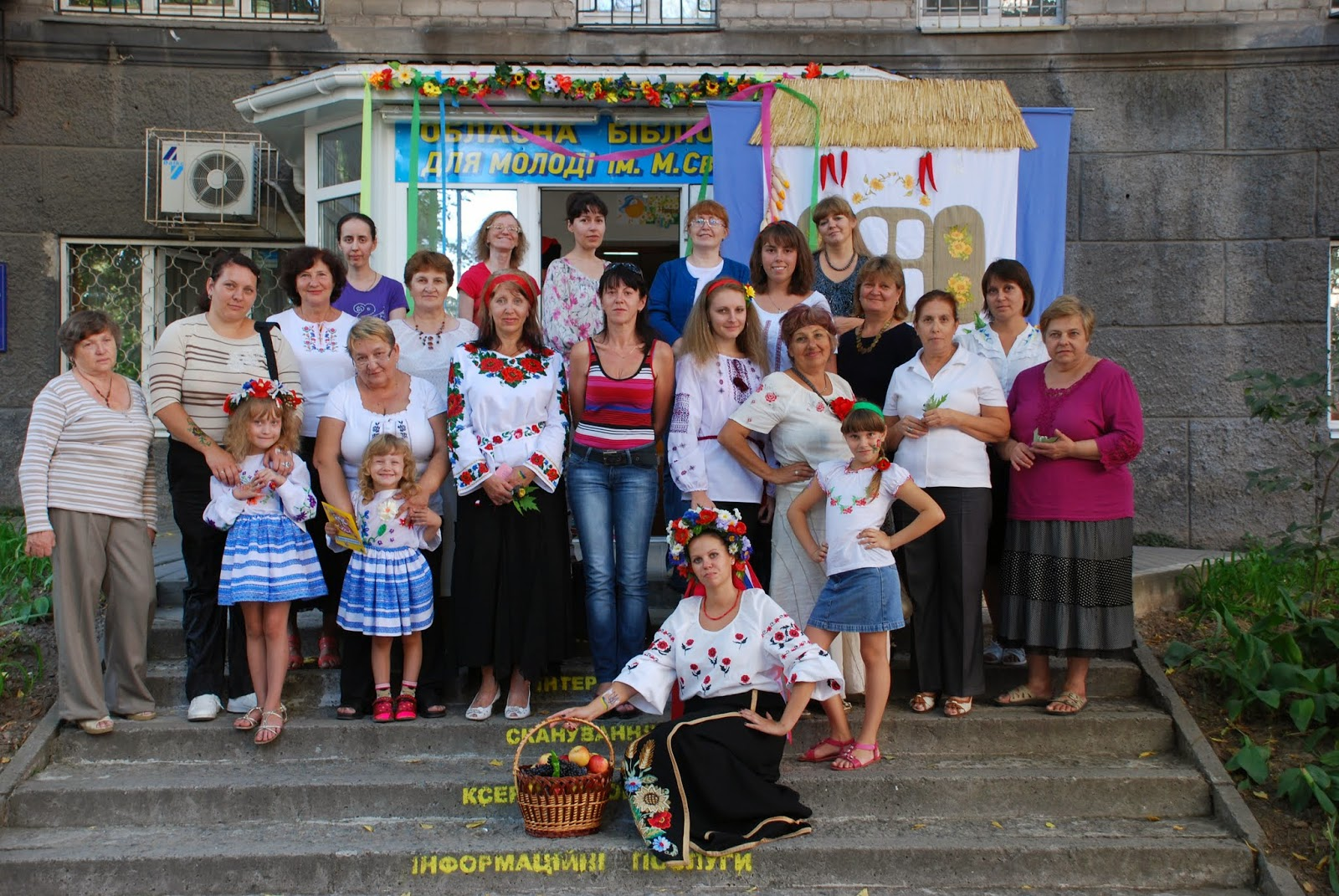 Патріотичний флеш-моб.